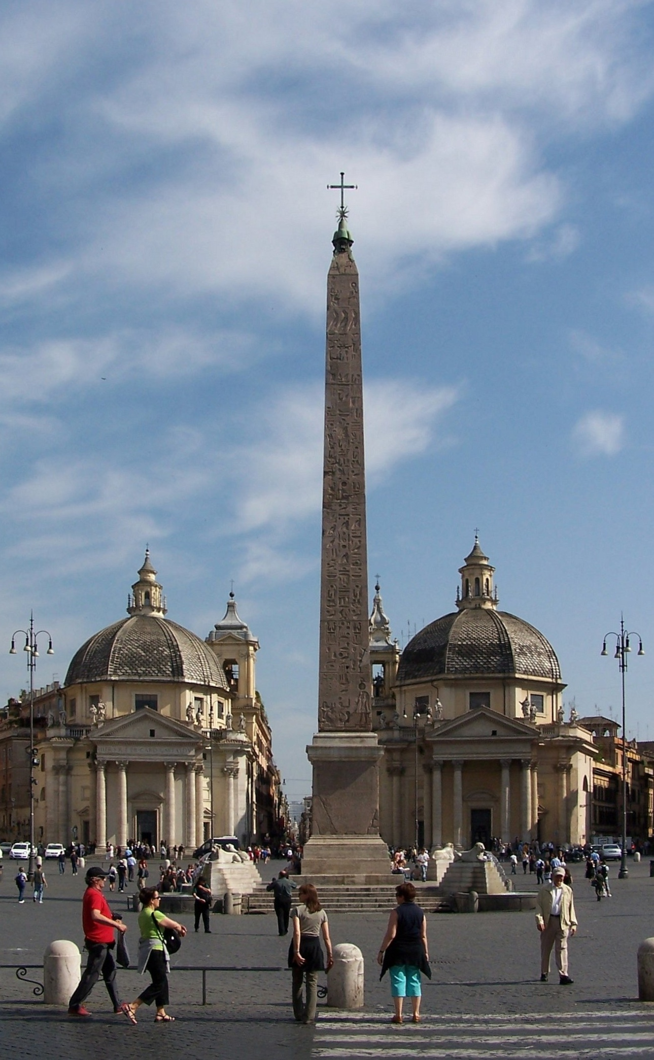 Roma Piazza del Popolo, Santa Maria di Monte Santo und Santa Maria dei Miracoli